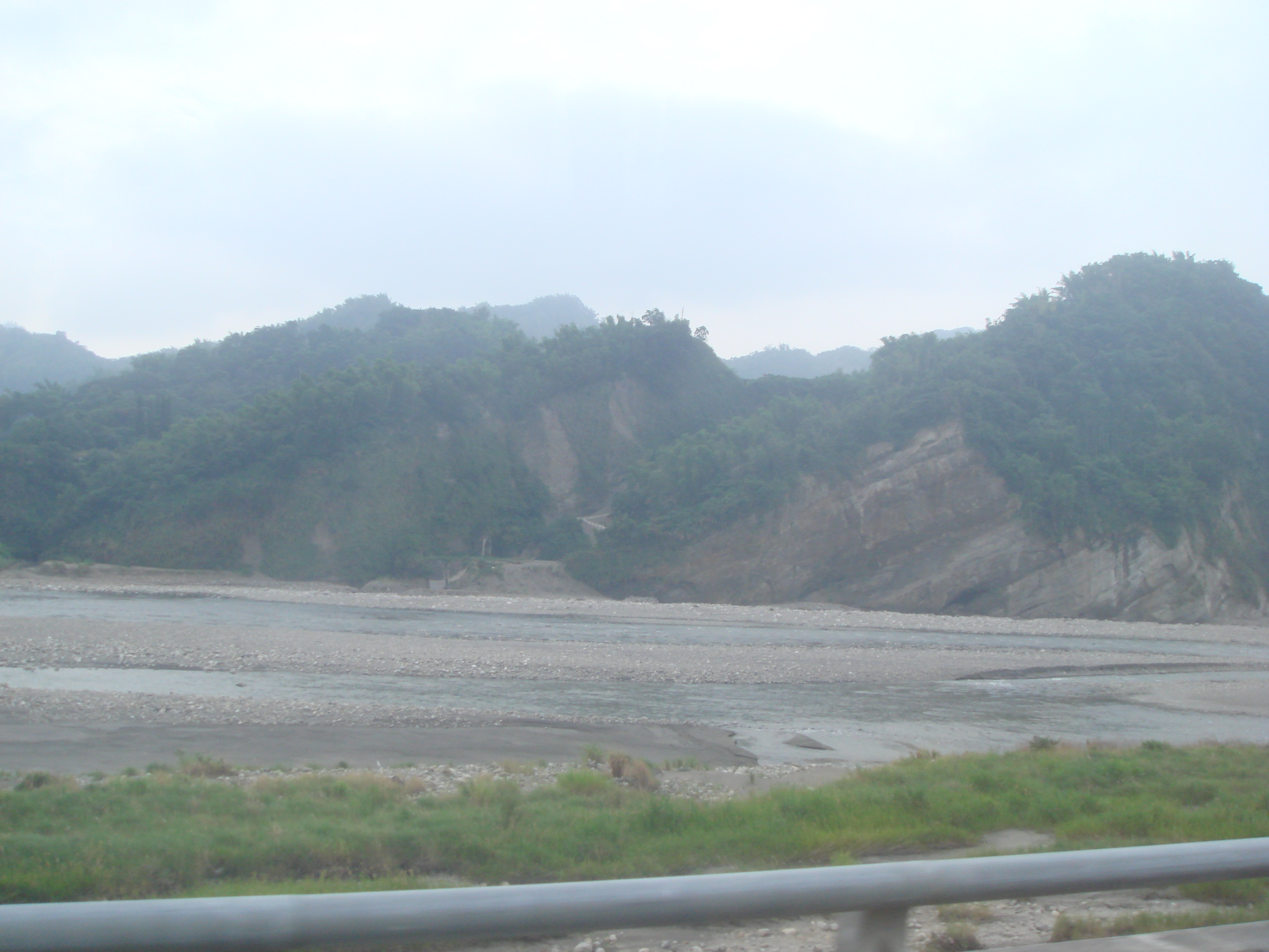 在國道6號看到霧峰山區的卓蘭層露頭